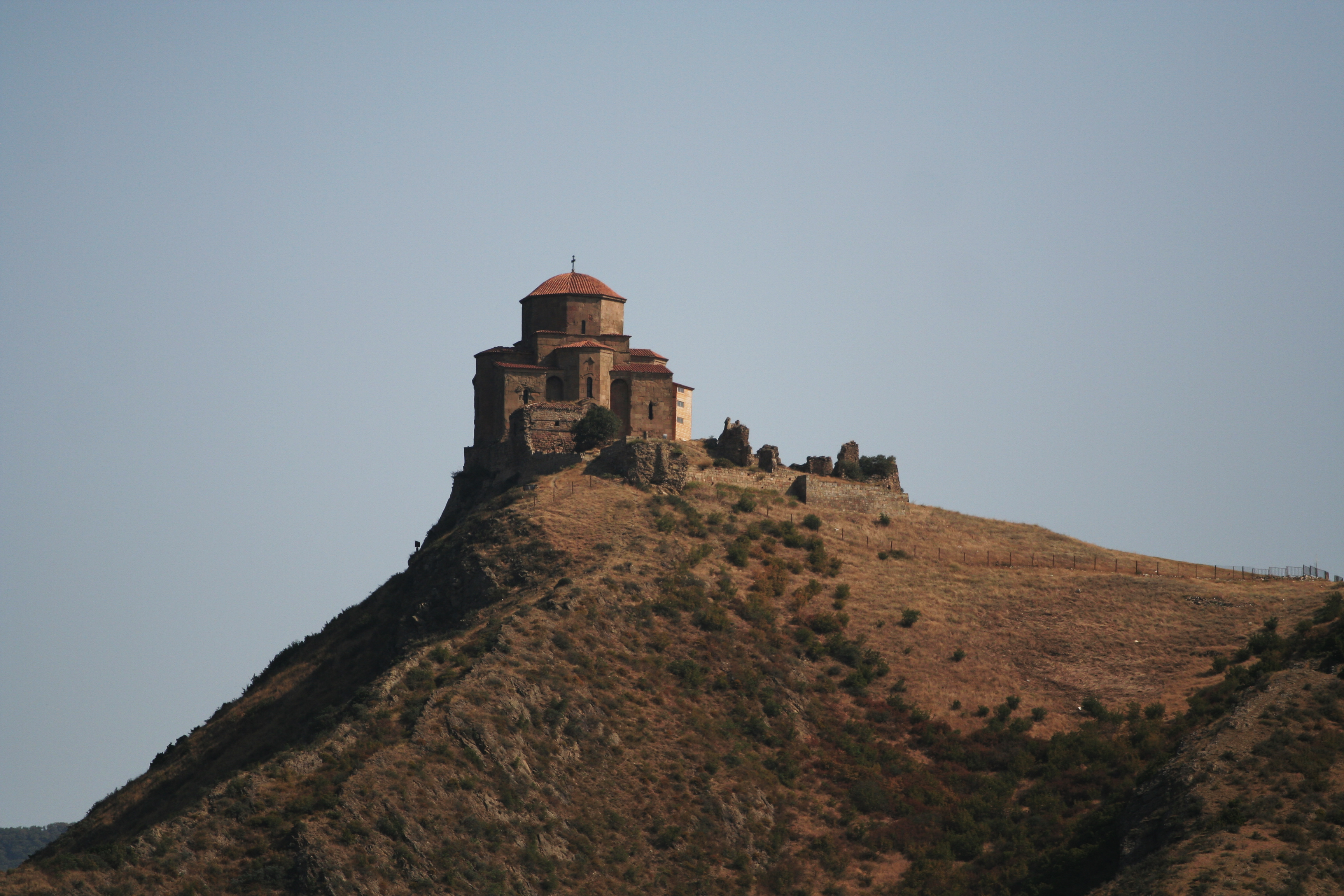 Jvari monastery